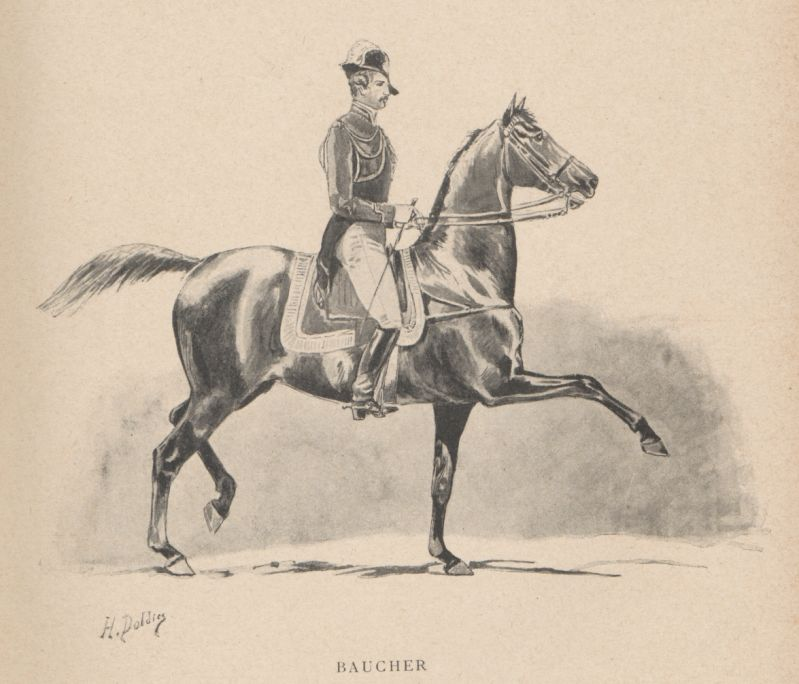 Illustration de François Baucher par Doldier, issu de l'ouvrage Propos d'un écuyer de F. Musany